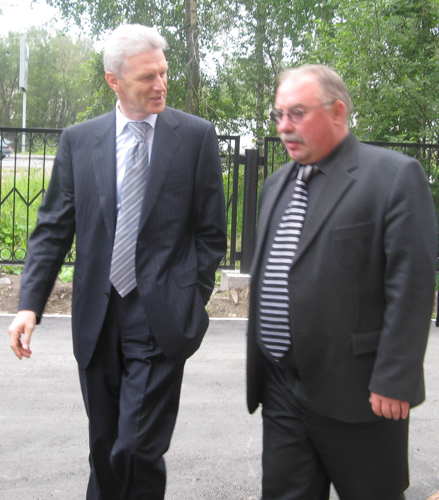 Министр Образования Фурсенко(слева) Приехал в г. Архангельск.